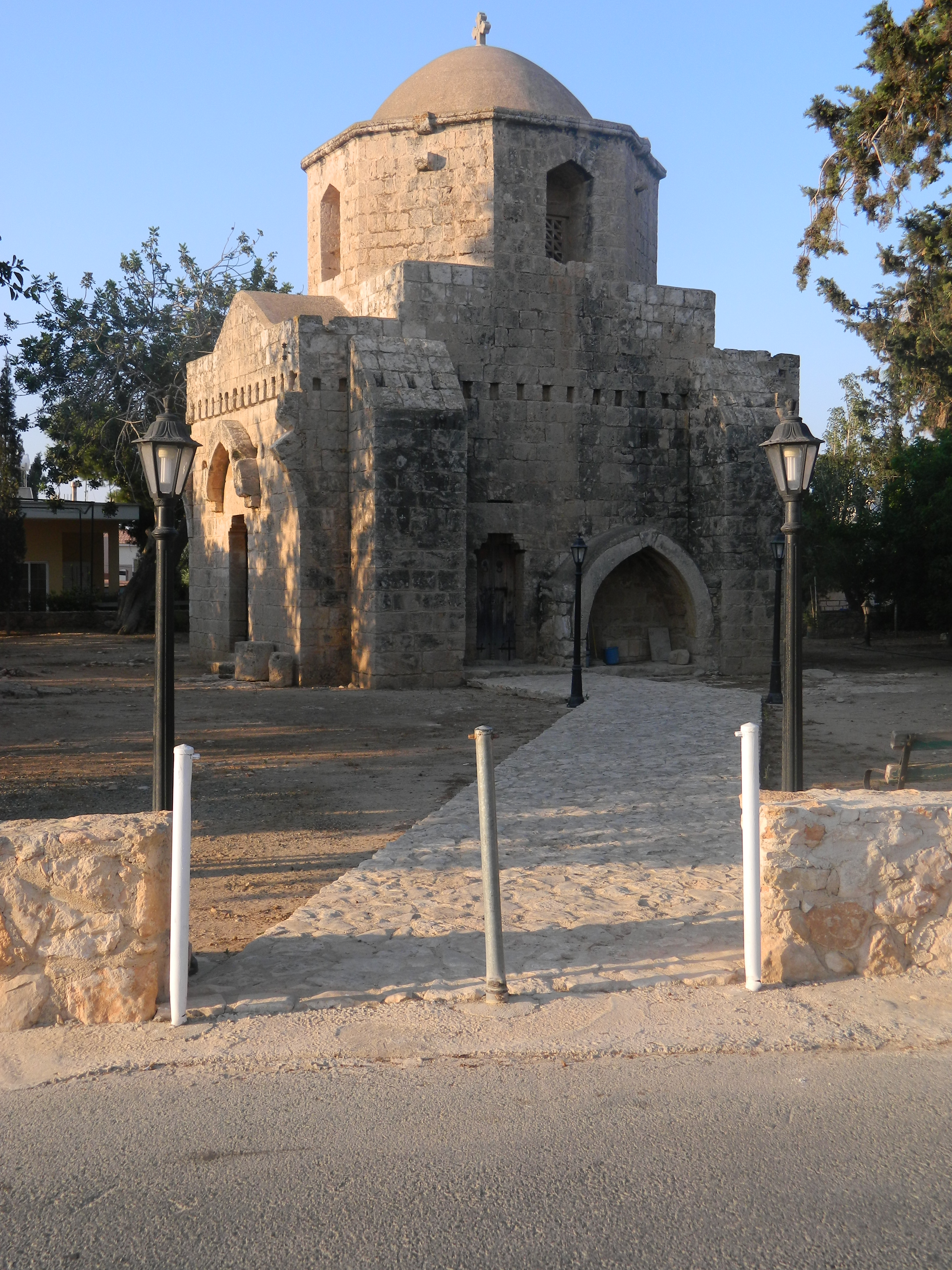 Agios Mamas